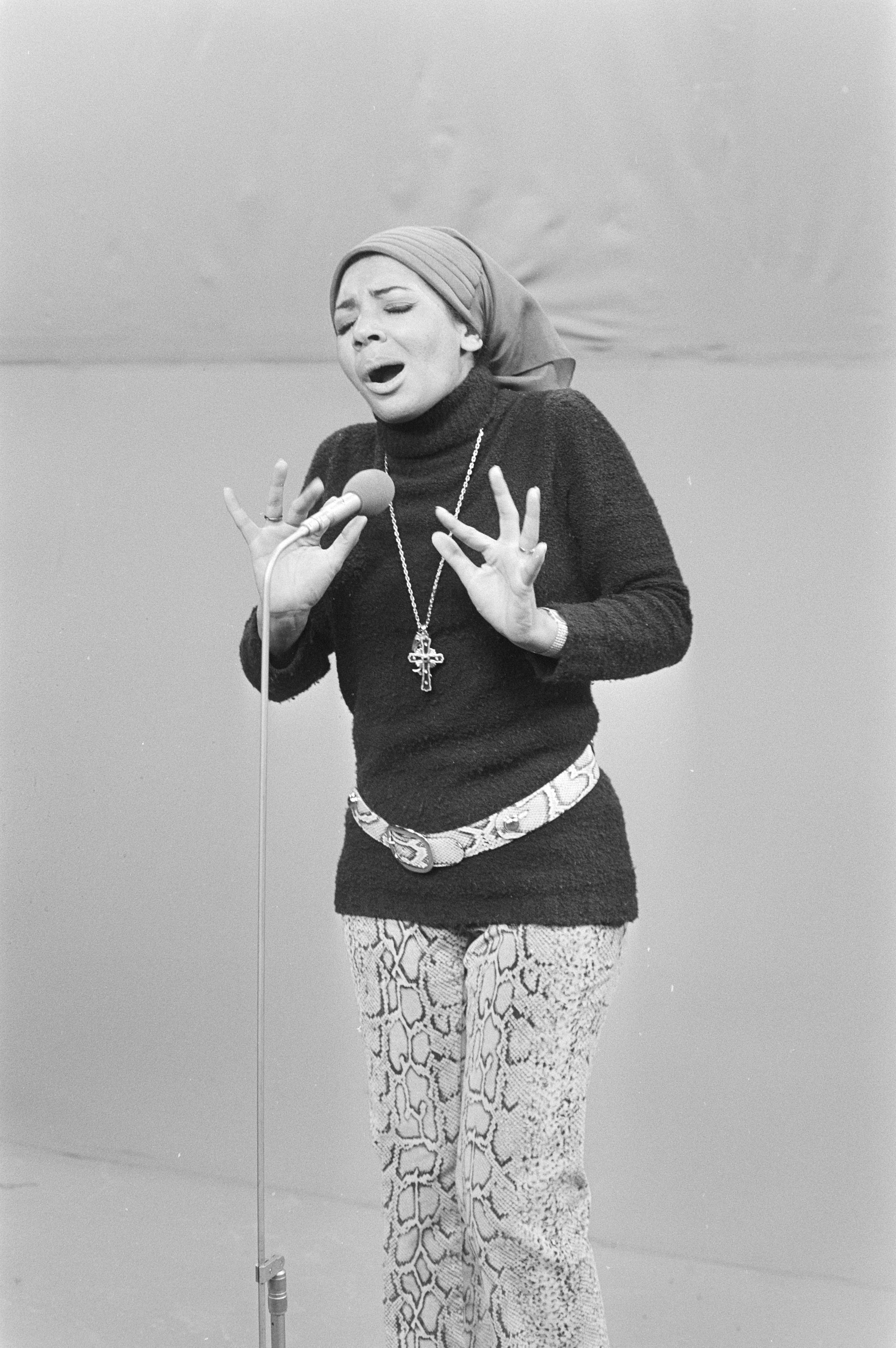 Collectie / Archief : Fotocollectie Anefo Reportage / Serie : [ onbekend ] Beschrijving : TV-opnamen van Engelse zangeres Shirley Bassey Datum : 11 januari 1971 Trefwoorden : TV-opnamen, zangeressen Persoonsnaam : Bassey, Shirley Fotograaf : Mieremet, Rob / Anefo Auteursrechthebbende : Nationaal Archief Materiaalsoort : Negatief (zwart/wit) Nummer archiefinventaris : bekijk toegang 2.24.01.05 Bestanddeelnummer : 924-1642